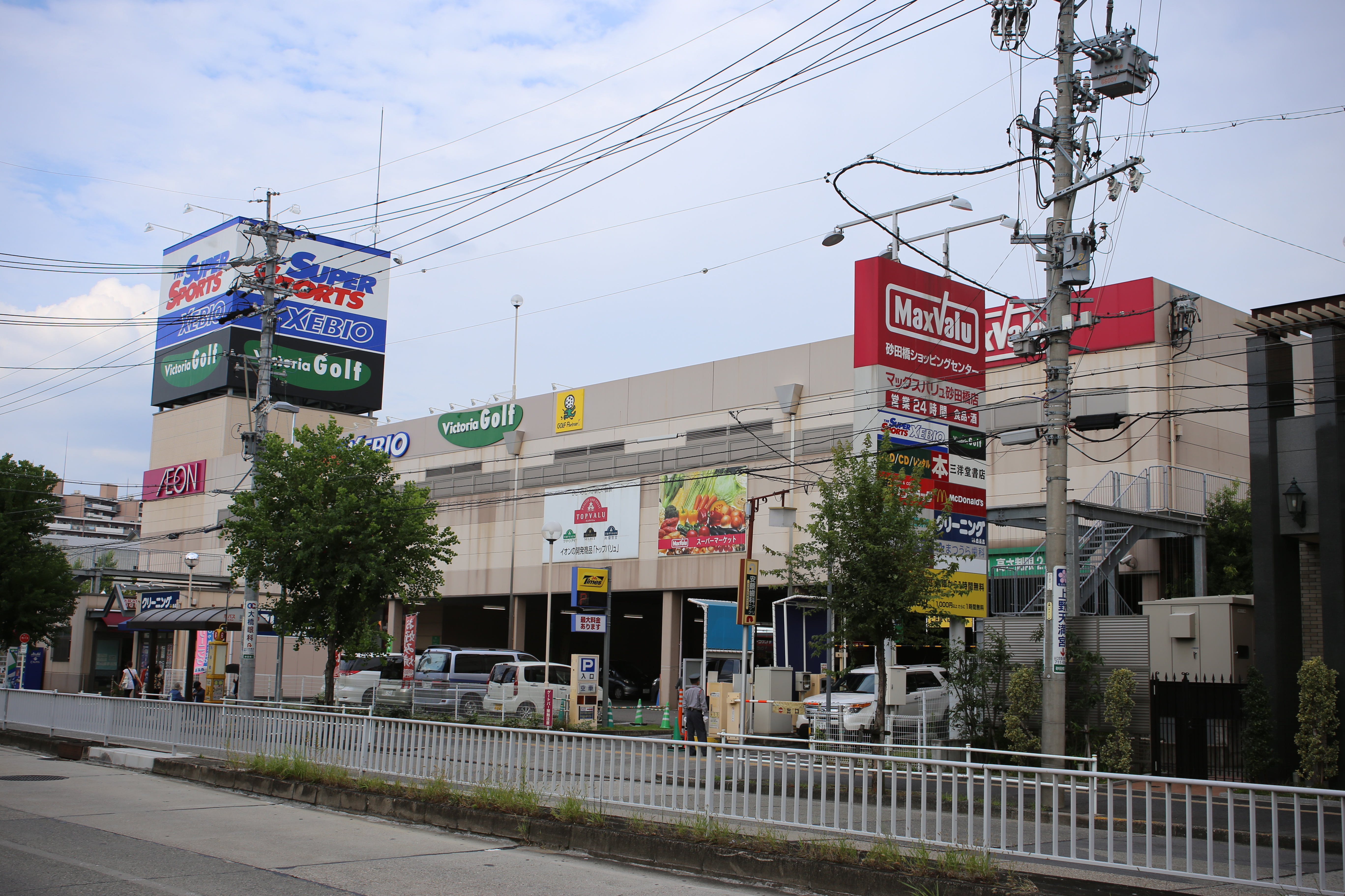 名古屋市東区砂田橋のマックスバリュ砂田橋ショッピングセンターを西側公道南側より撮影